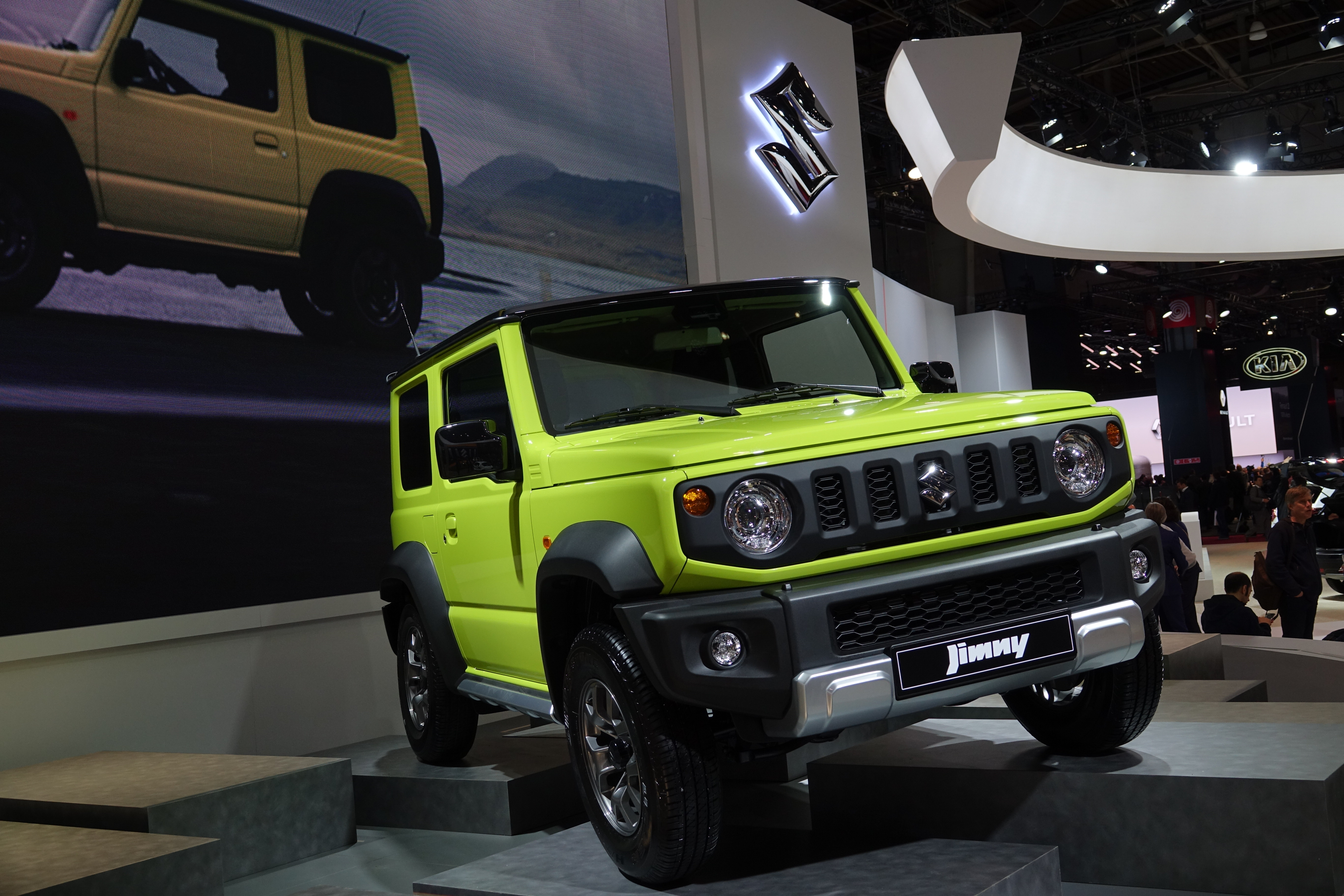 Suzuki Jimny au Mondial de l'auto de Paris 2018